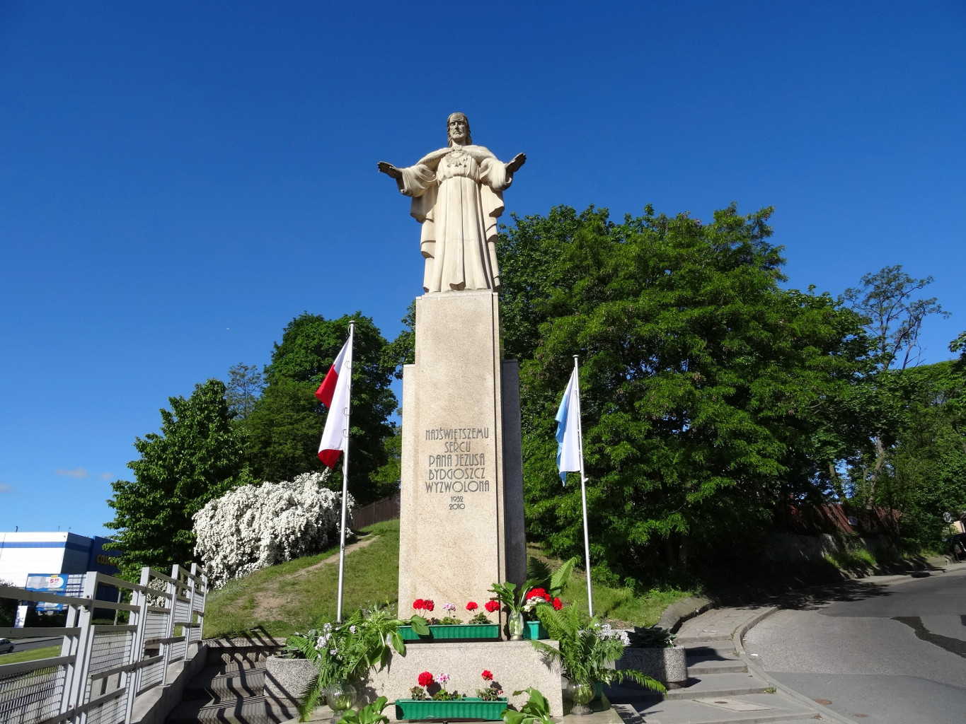 Pomnik Najświętszego Serca Pana Jezusa w Bydgoszczy przy ul. Seminaryjnej ustawiony w 2010 roku, odtworzony wg wzoru z 1932 r.